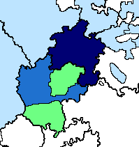 Гессен, Насау и Кургессен в 1944 году